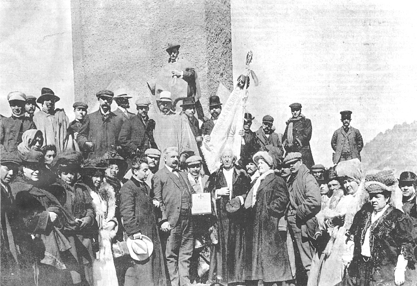 Cristo Redentor de los Andes en el límite de Argentina y Chile:Fray Marcolino Benavente y Ángel Oliveira (centro abajo) ante la piedra fundamental del refugio para viajeros, (que jamás se levantó) en 1908).